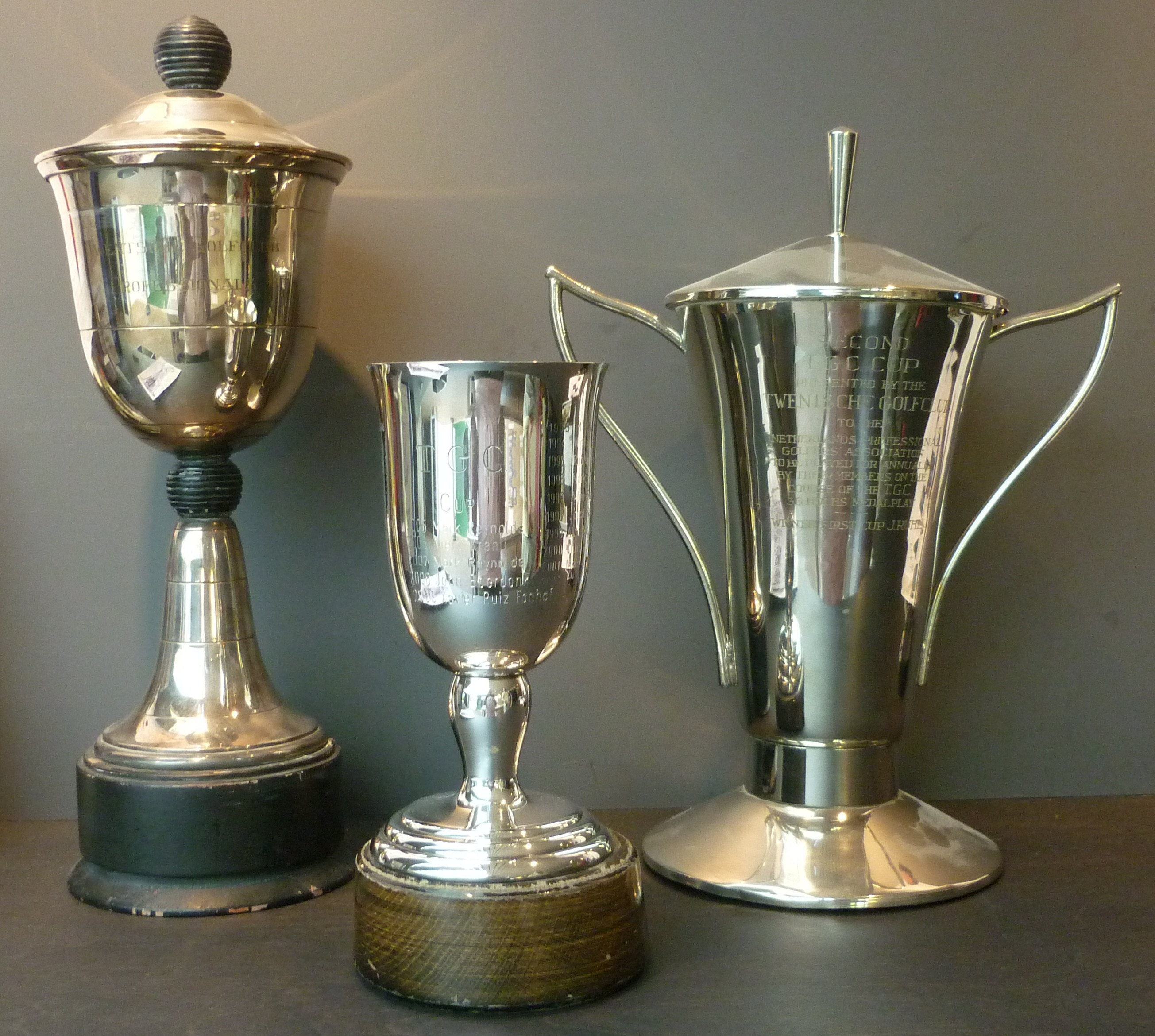 Twente Cup, drie bekers